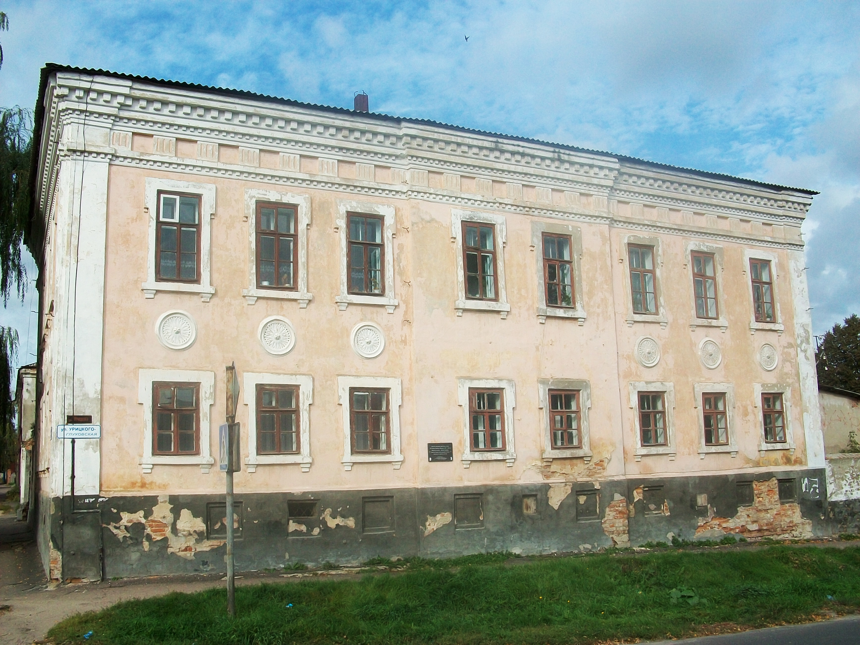 Будинок Г. І. Шелехова (Рильськ)